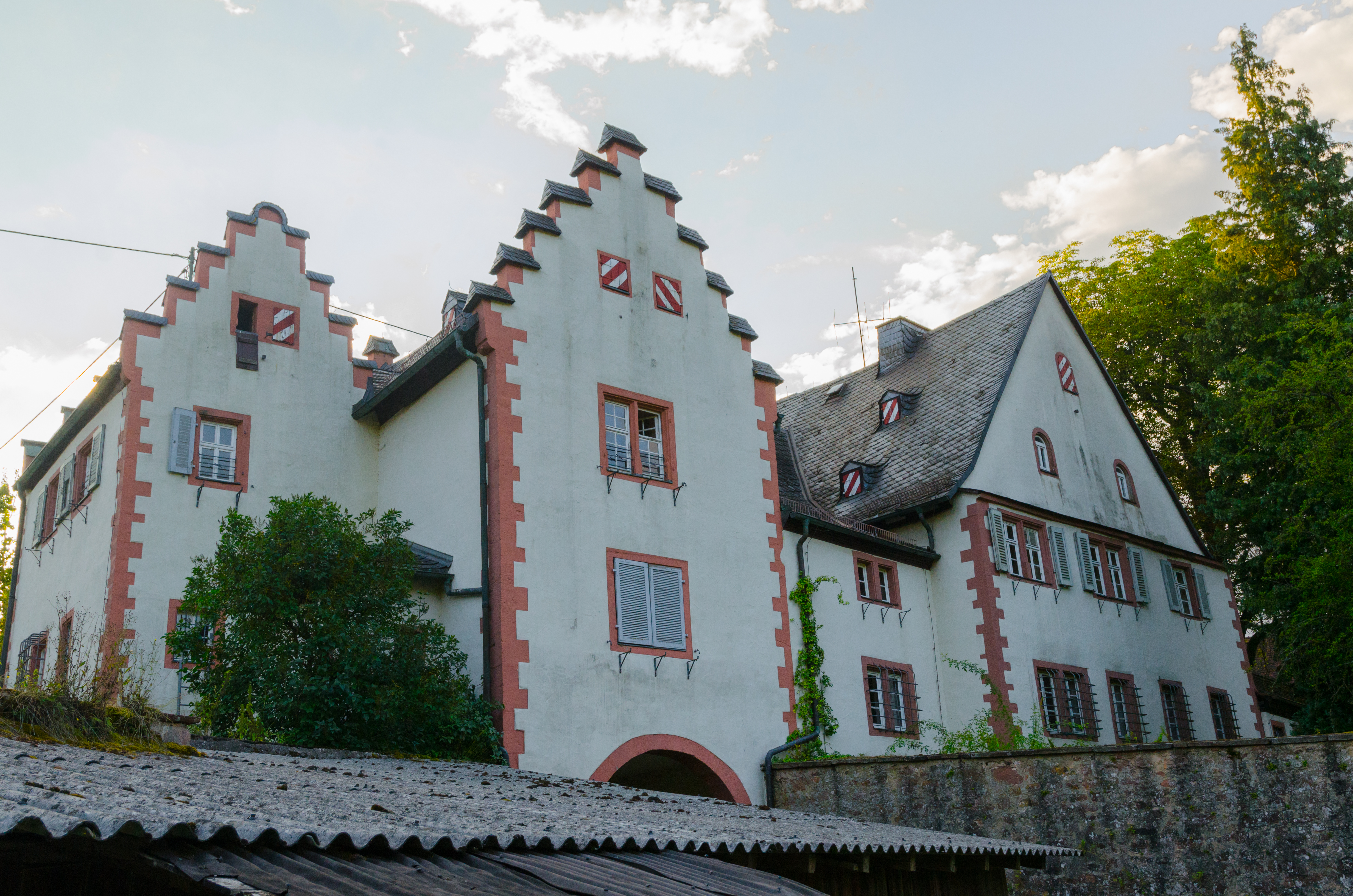 Wolfsmünster, Am Schloß 3, Schloß